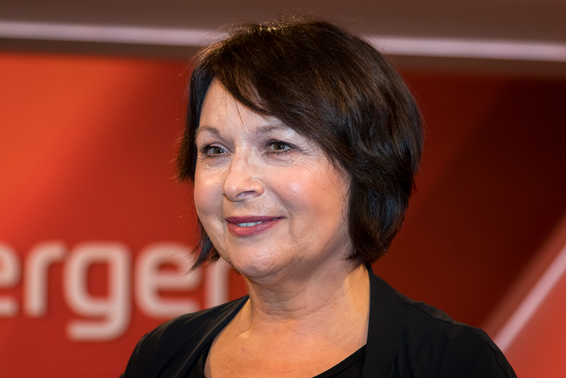 Angelika Kallwass in der WDR-Sendung "Maischberger" am 14.6.2017